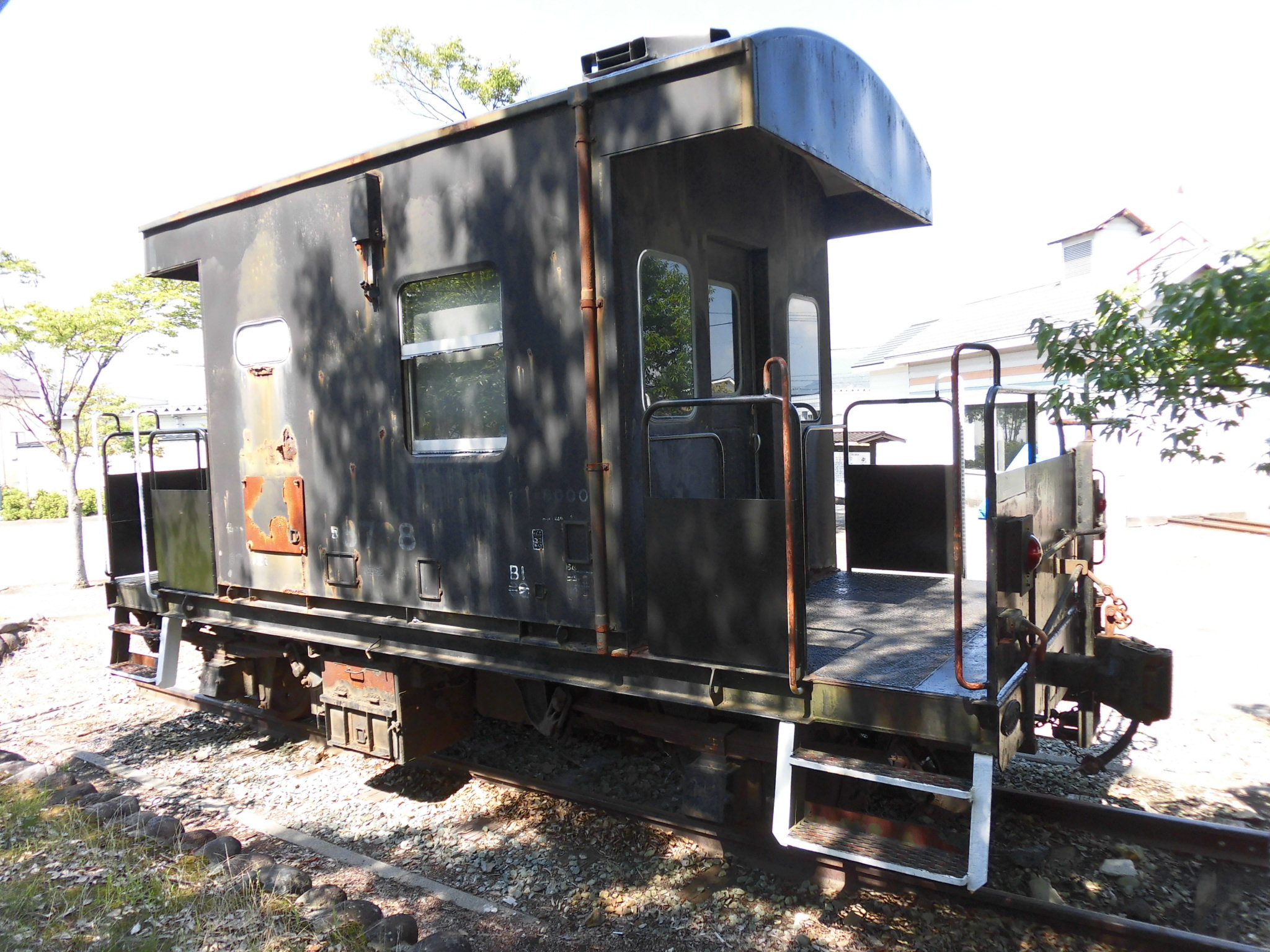 ヨ8798貨車。河北中央公園（山形県西村山郡河北町）に所在。 国鉄ヨ8000形貨車。